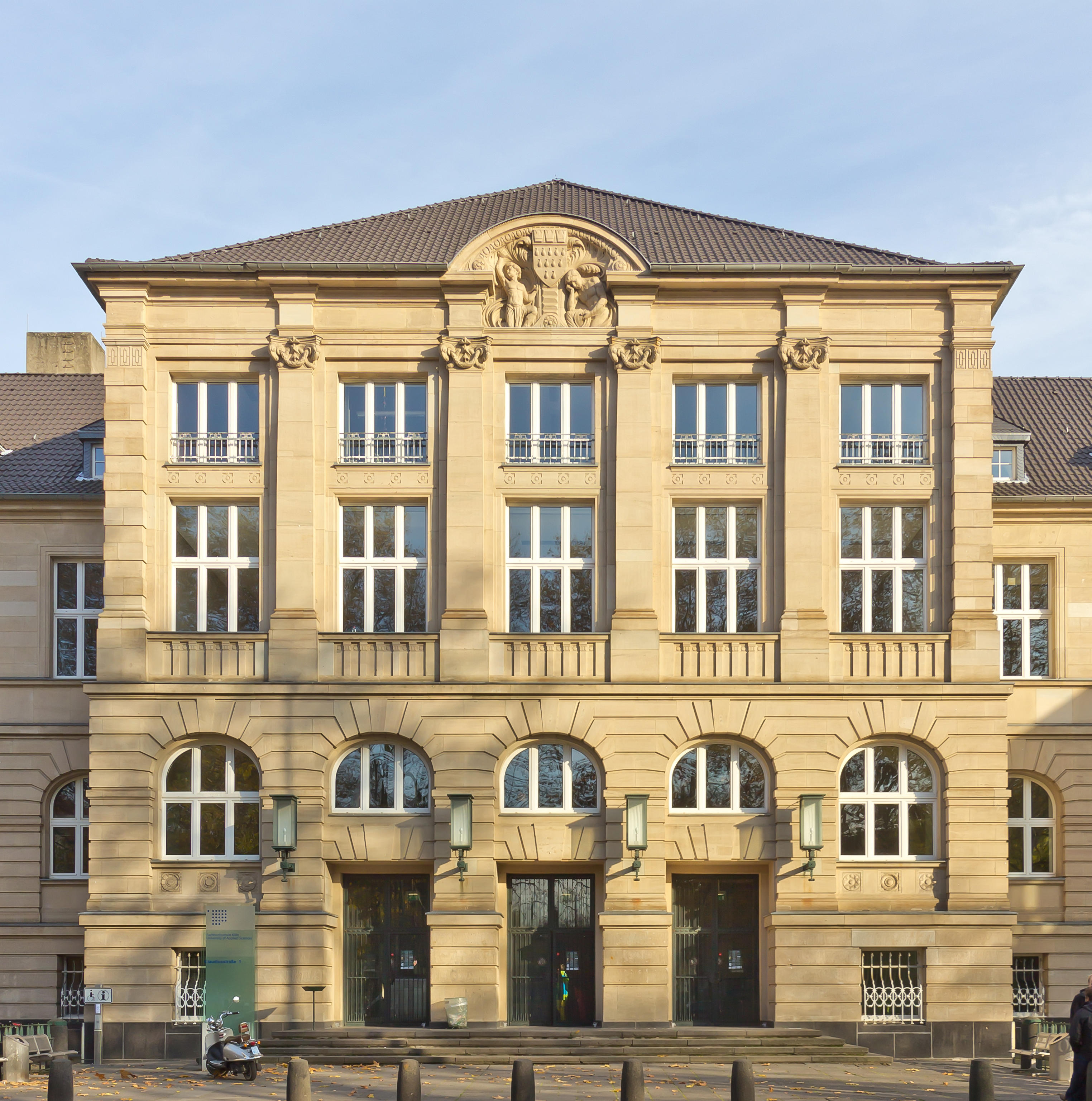 Gebäude der Alten Universität, Claudiusstr. 1, Köln. Heutige Nutzung: Fachhochschule Köln - Campus Südstadt, GWZ Foto: Haupteingang/Front